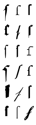 Das lange s »ſ» in verschiedenen Schrifttypen (v.l.n.r.: MA Bastarda, Garamond, Arial, Manuscript Gotisch, DS-Rudolph-Koch Kurrent, Fette Kanzlei OsF, Fraktur, DS-Gotenburg,Courier New, MA GKursiv1, DS-Deutsche Kursiv, Jenson, Ganz Grobe Gotisch, DS-Kurrent, DS-Tannenberg, DS-Wallau-Halbfett, Ehmcke-Antiqua (Carlton), und eine lateinische Schreibschrift)